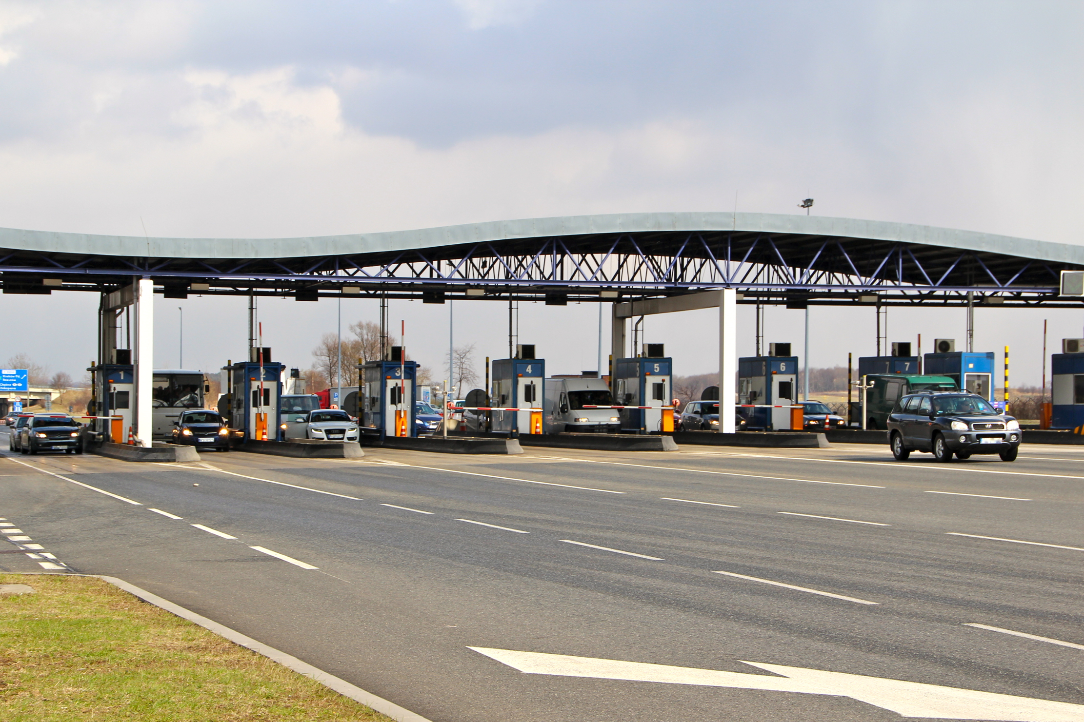 Punkt poboru opłat Balice na autostradzie A4.